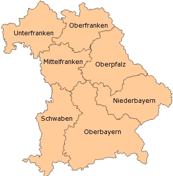 Baverian Admin Districts (Regierungsbezirke)